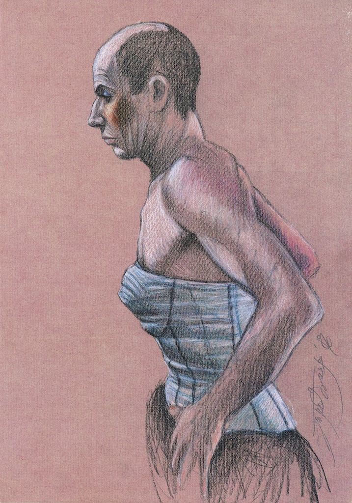 Pastell auf Ingres Büttenpapier 42 x 52 cm, 1986 Monatelang beobachtete Jürgen Draeger die Musical-Proben von „La Cage aux Folles“ (Ein Käfig voller Narren) im Theater des Westens Berlin.